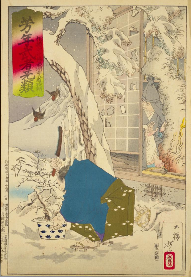 相模守北条最明寺入道時頼 月岡芳年画「芳年武者无類（よしとしむしゃぶるい）」。北条時頼の鉢木伝説を描いたもの。時頼が諸国行脚の際、雪を避けるために泊めてもらった家の主人が貧しさからくべる薪もないと言って大切にしていた盆栽の木を薪にするべく手折った場面。主人は没落した鎌倉武士で、困窮しても命令があればいつでも駆けつけられるよう武具と馬は大切にしており、のちに時頼が招集の命を出したところ実際に痩せ馬で駆けつけ、時頼から褒美を授かった。この謡曲「鉢木」は「いざ鎌倉」の語源となった